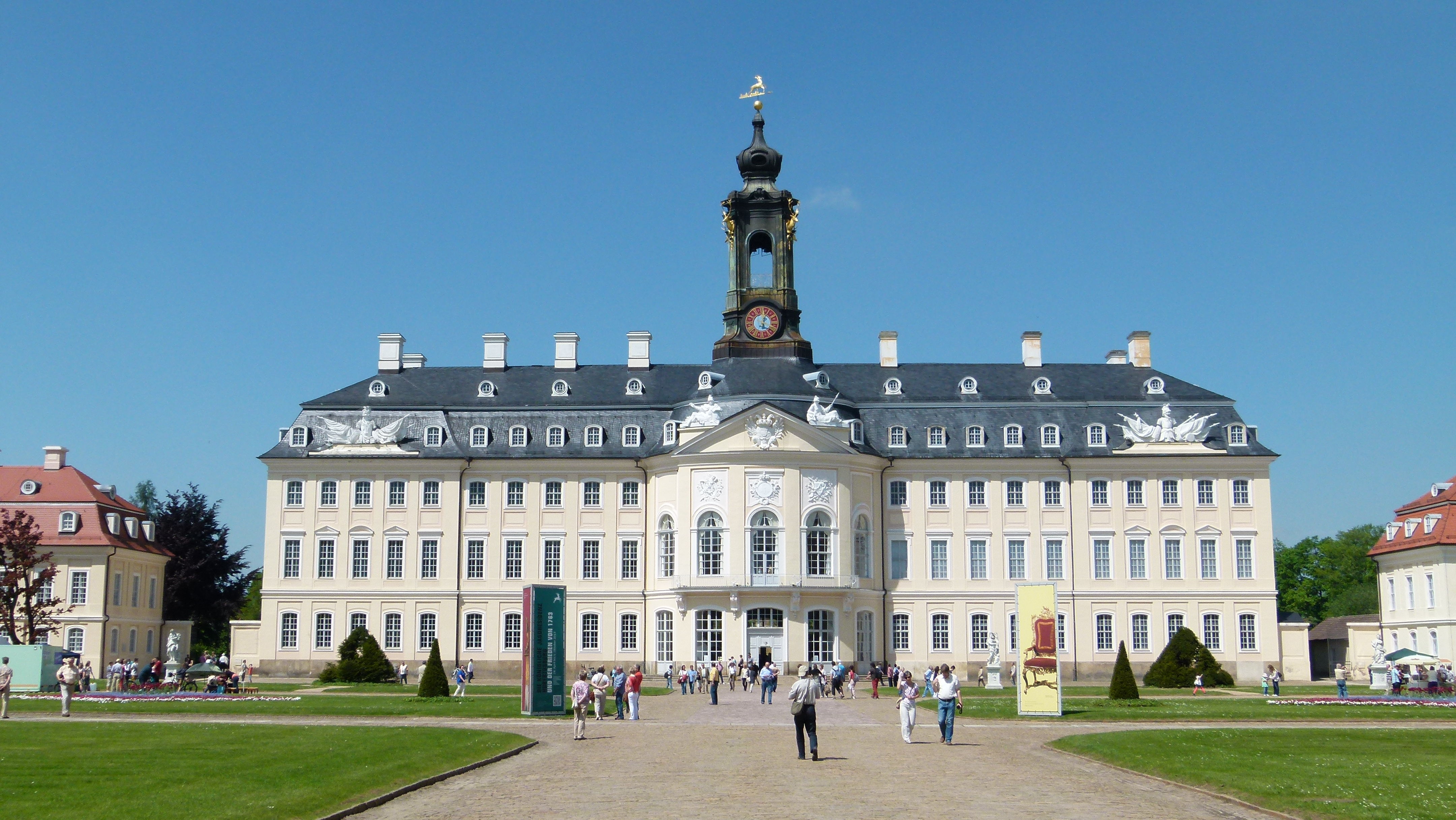 Schloss Hubertusburg, Wermsdorf, Sachsen